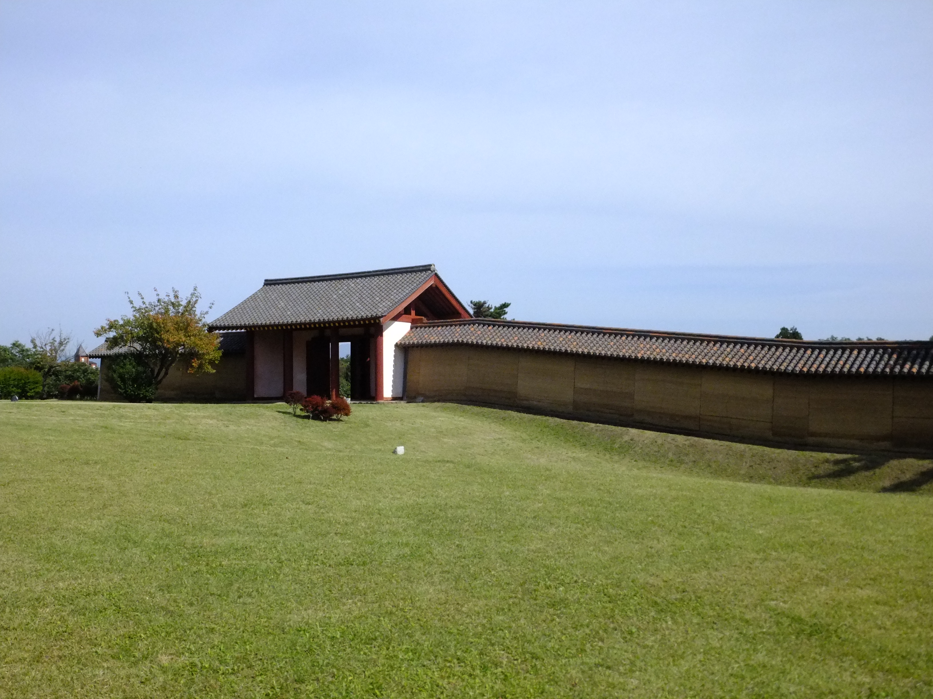 秋田城跡復元東門